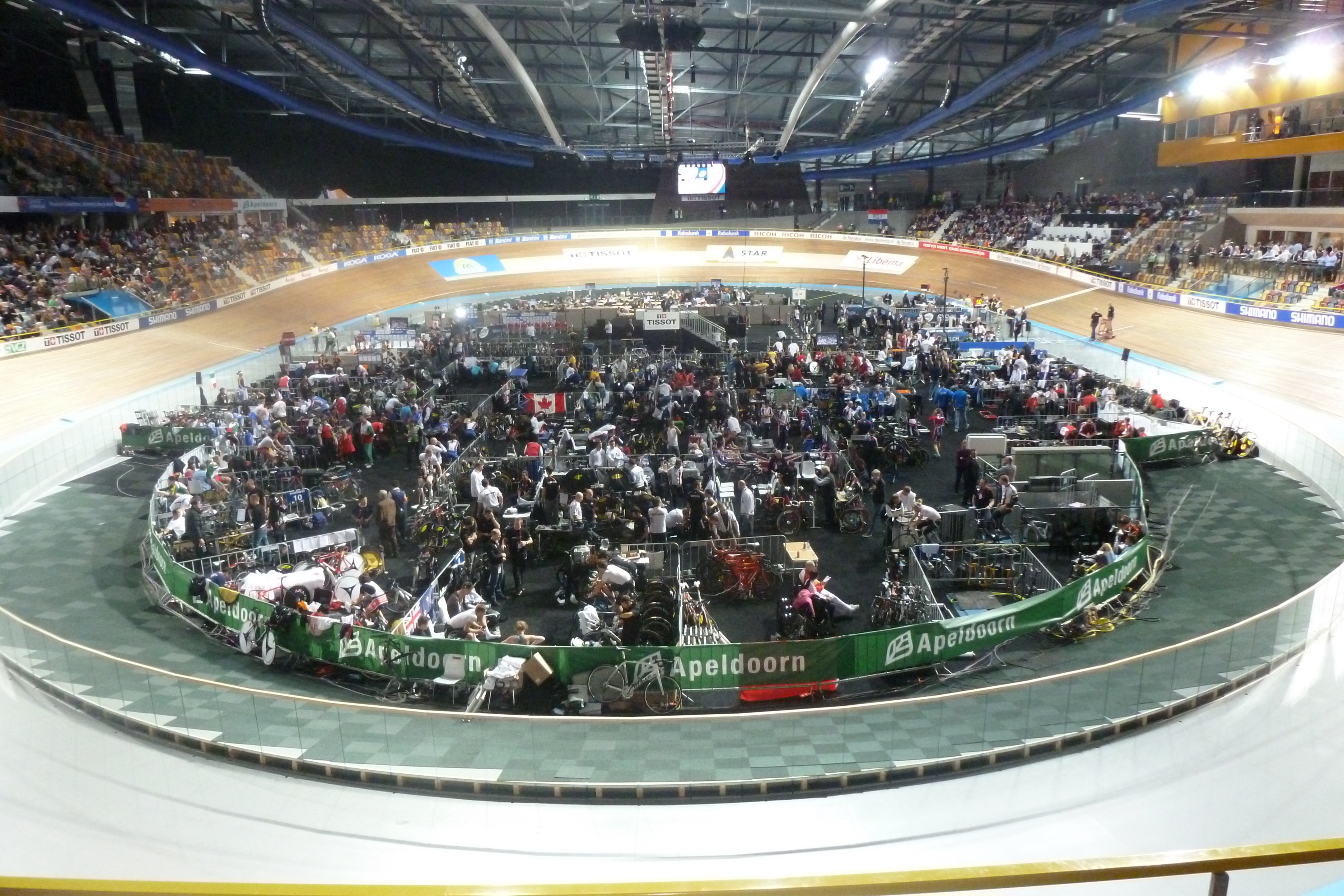 Omnisport Apeldoorn, Bahn-WM 2011, von innen